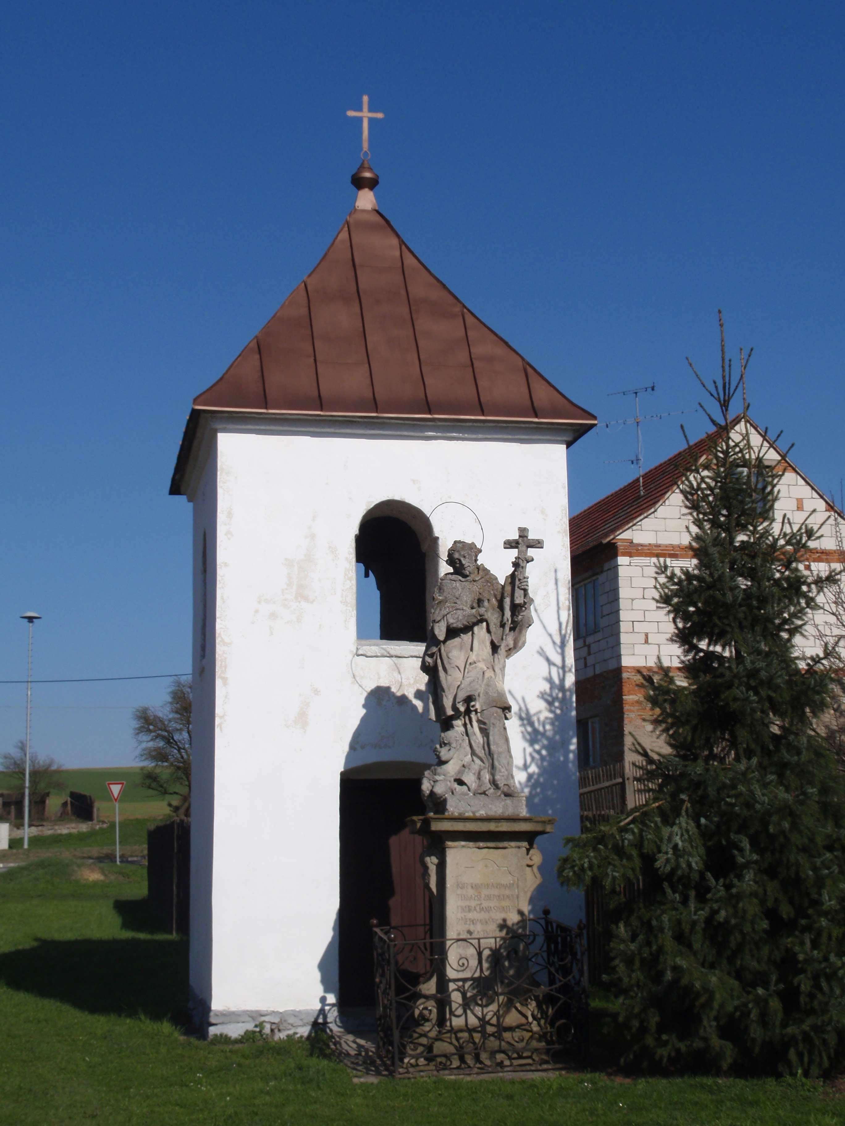 Zvonice se sochou sv. Jana Nepomuckého (Otradice), náves, Otradice